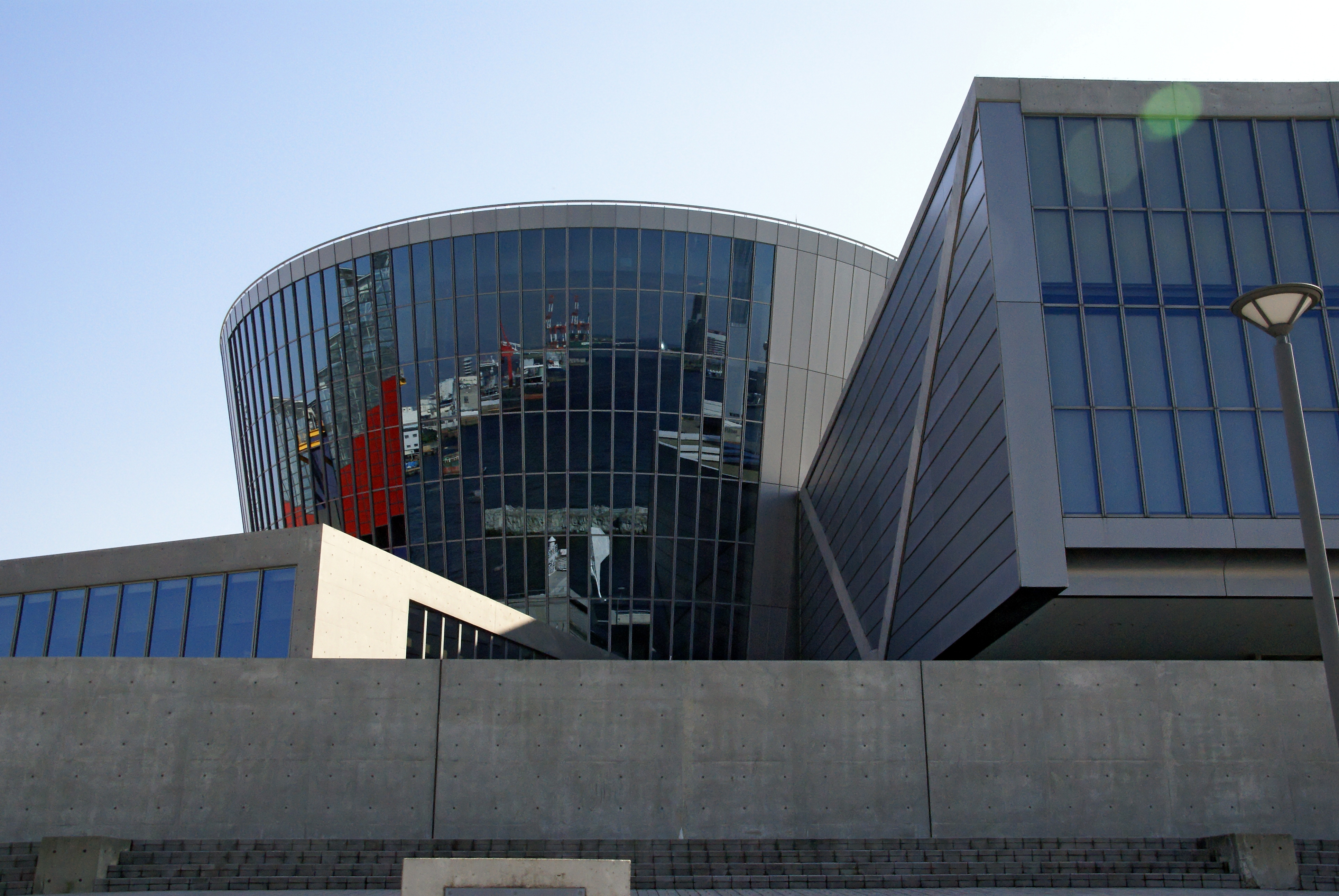 Suntory Museum in Osaka, Osaka prefecture, Japan